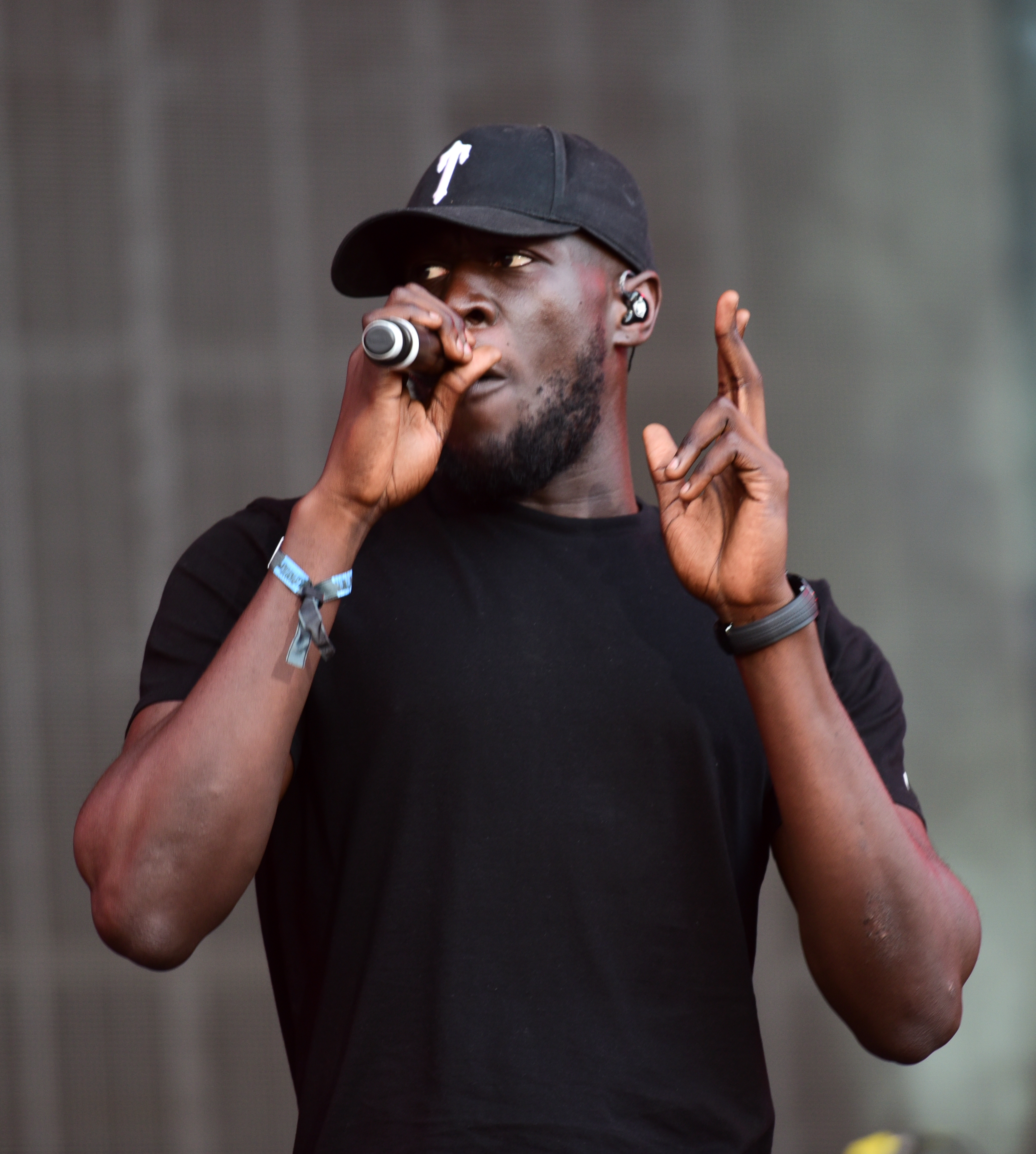 Stormzy live auf dem Openair Frauenfeld 2019